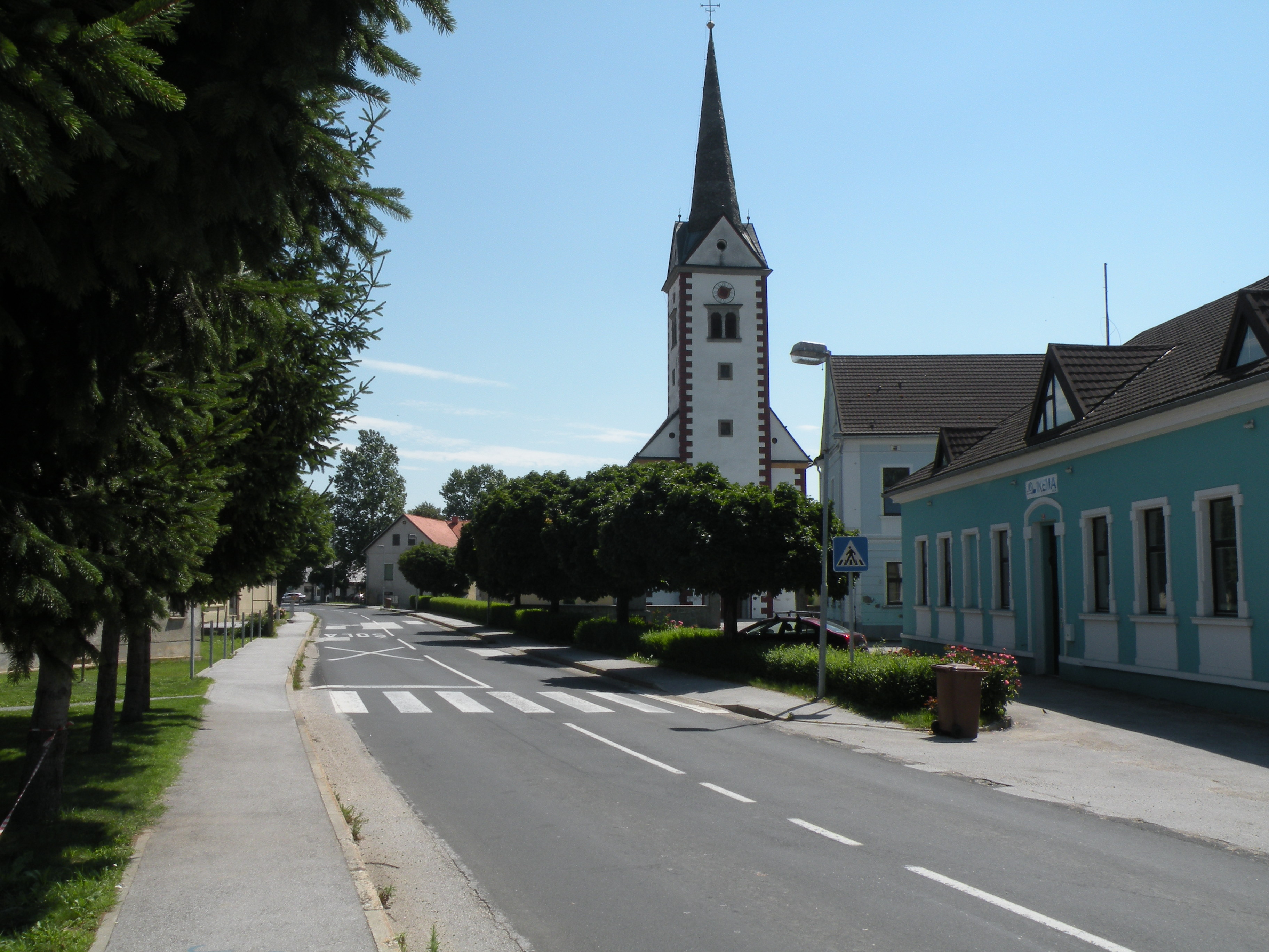 Osrednji del vasi